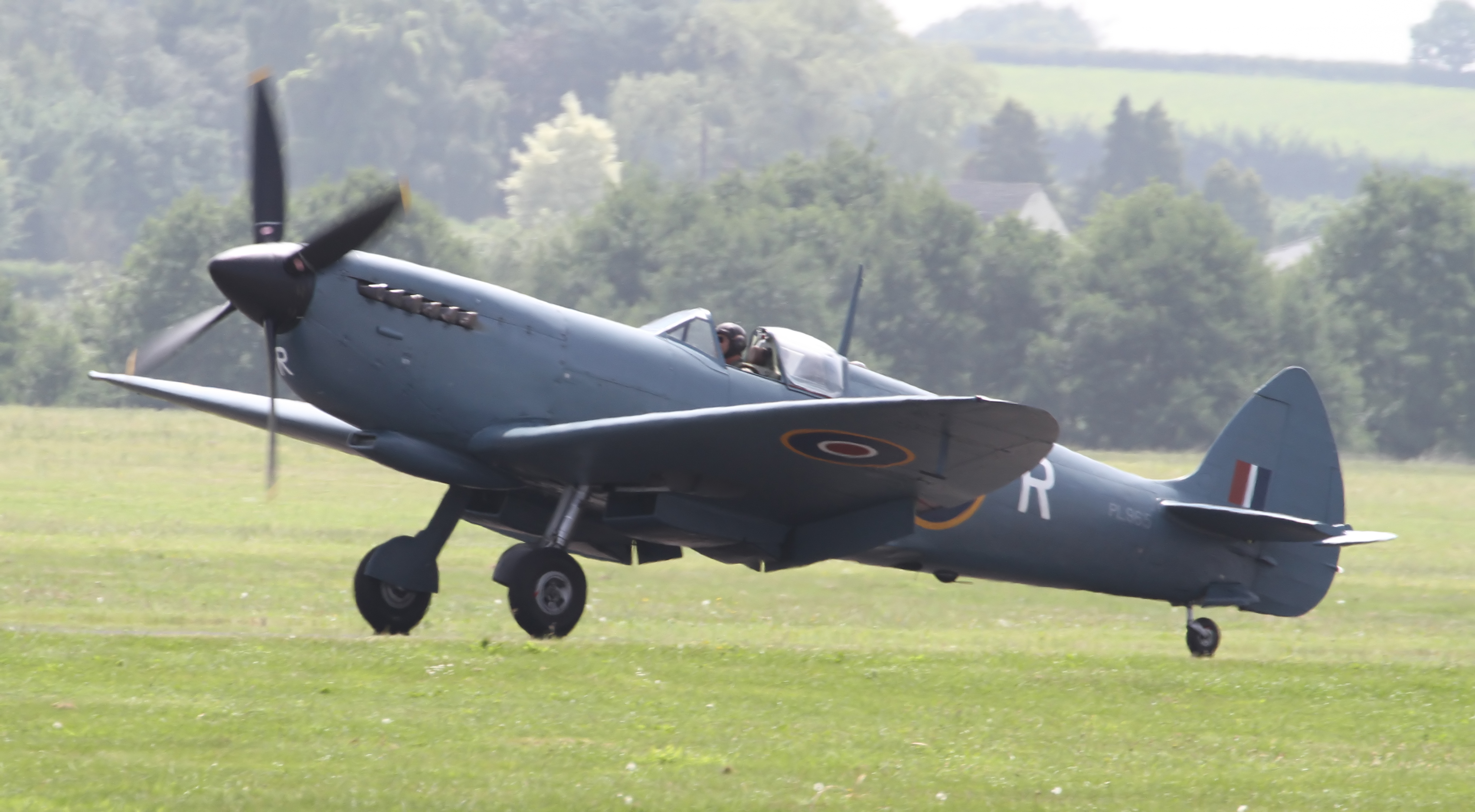 Supermarine Spitfire PR Mk XI PL965 4